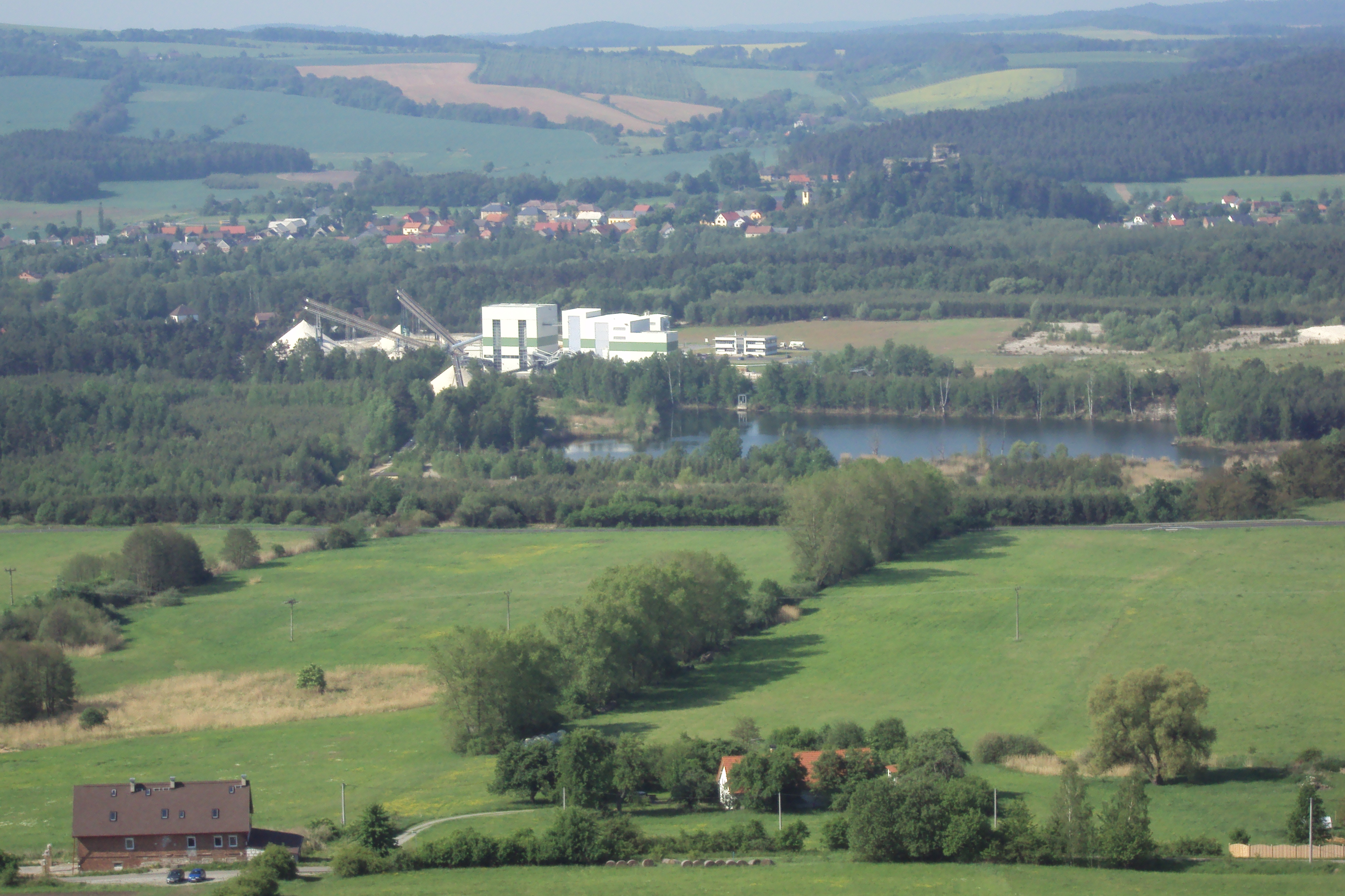 Areál Provodínské písky z vrcholu Lysé skály